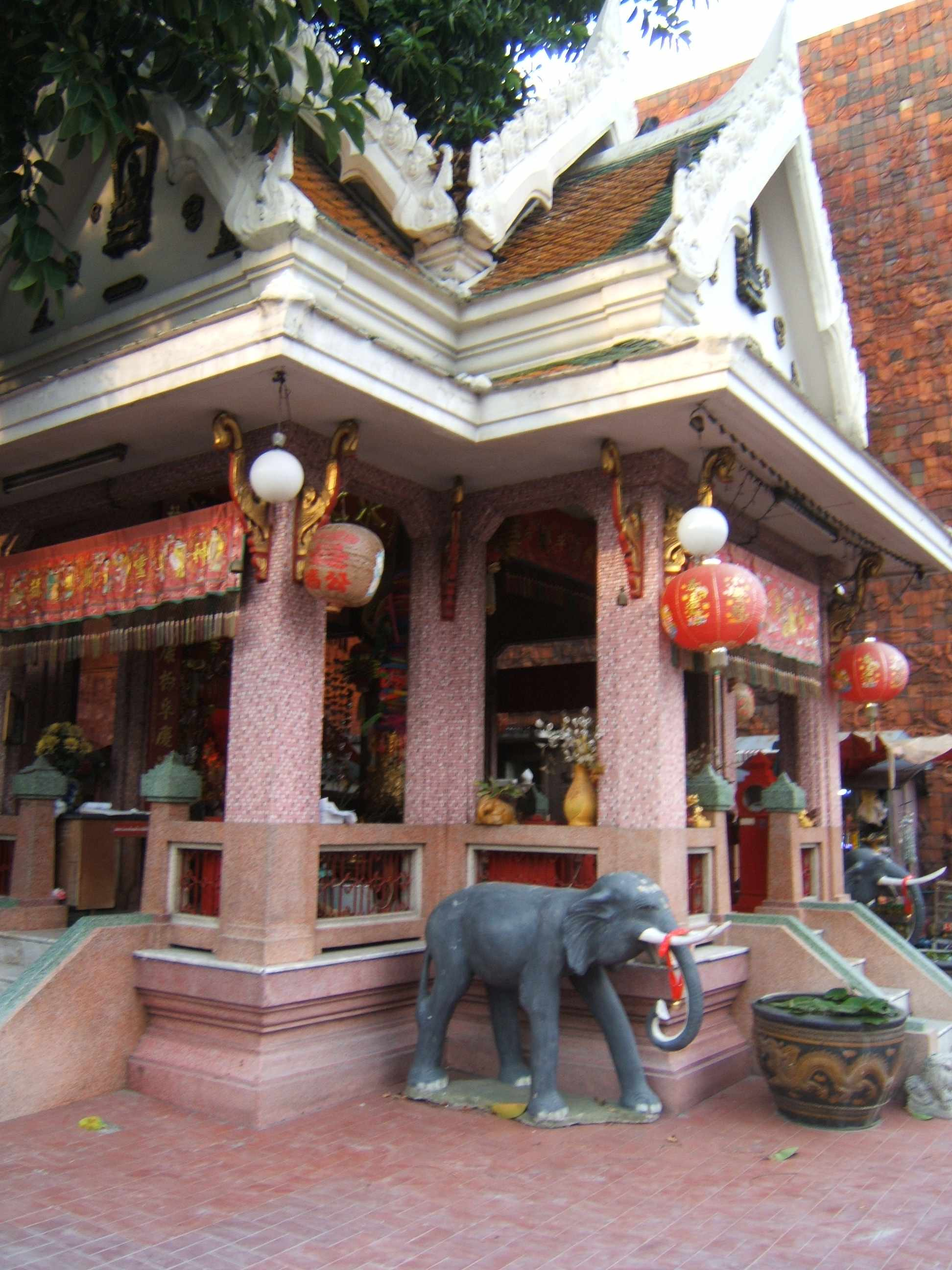 Sao Lak Mueang in Nakhon Ratchasima, Thailand